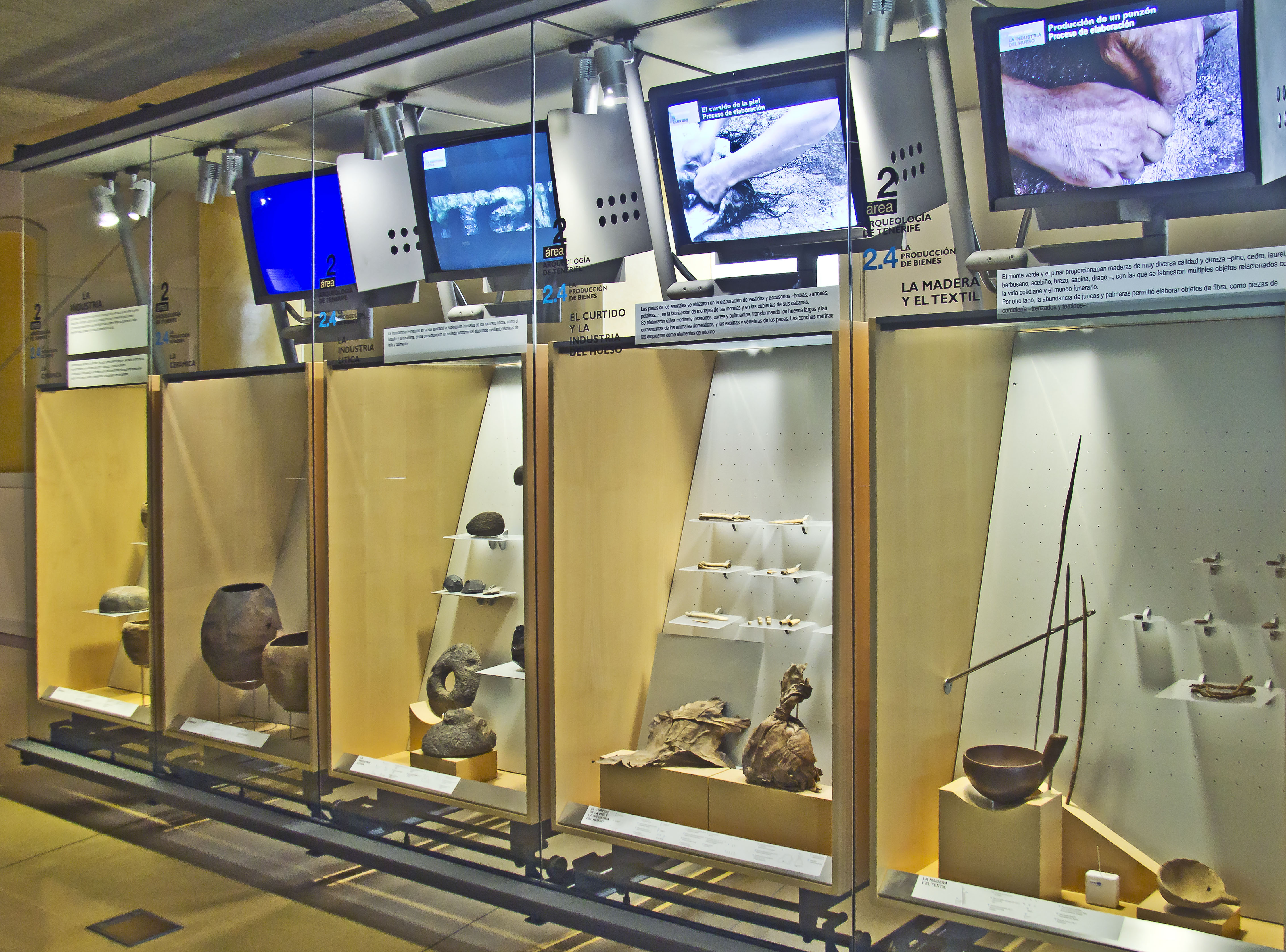 Museo de la Naturaleza y el Hombre Santa Cruz de Tenerife / Exposición Planta Primera Arqueología Área 2 / La Producción de Bienes